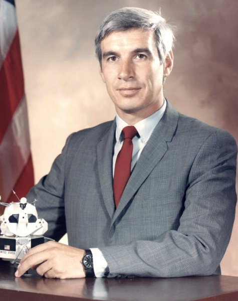 NASA astronaut John Anthony Llewellyn